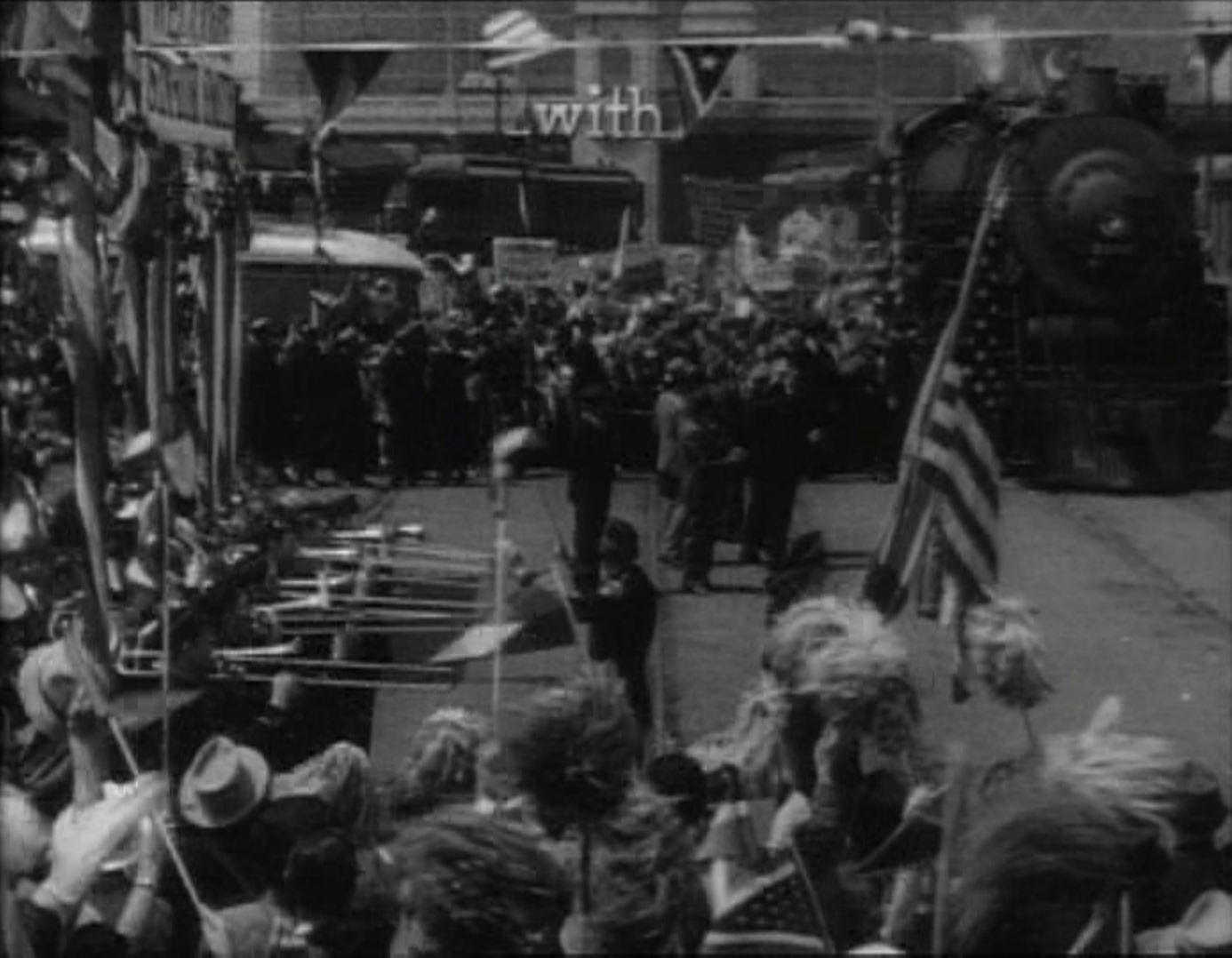 Mr. Smith Goes to Washington, deleted scene